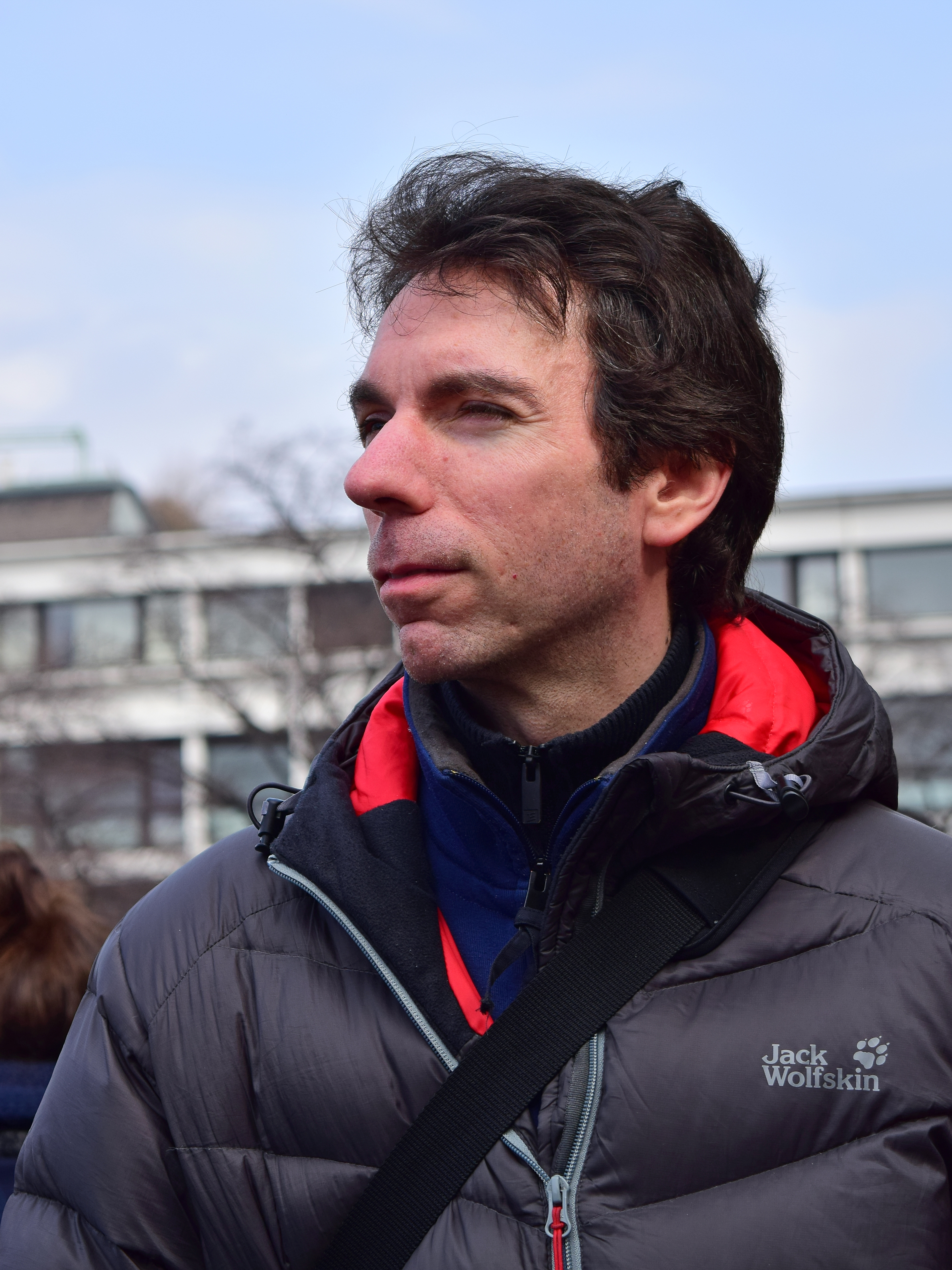 Alexander Pollak (SOS Mitmensch) bei der Demonstration „Flüchtlinge willkommen! Nein zur Festung Europa!“ am 19. März 2016 in Wien.